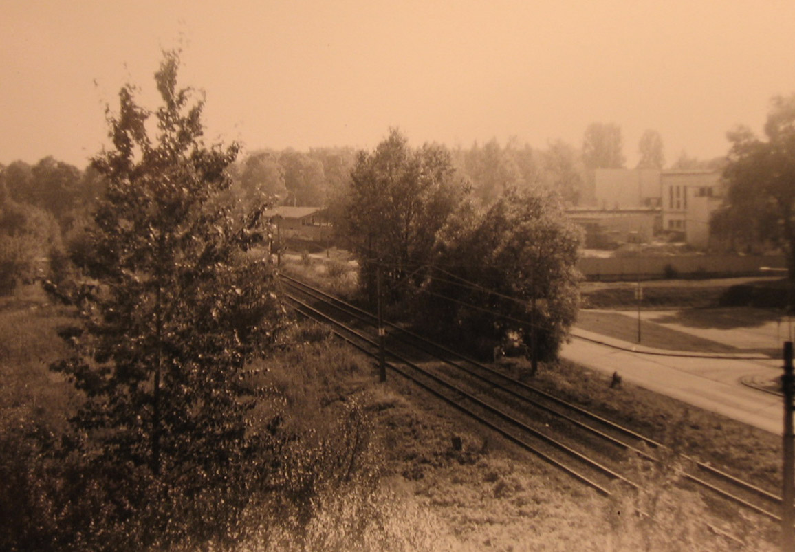 Przyczółek rozebranego mostu przy CH "Zakopianka".